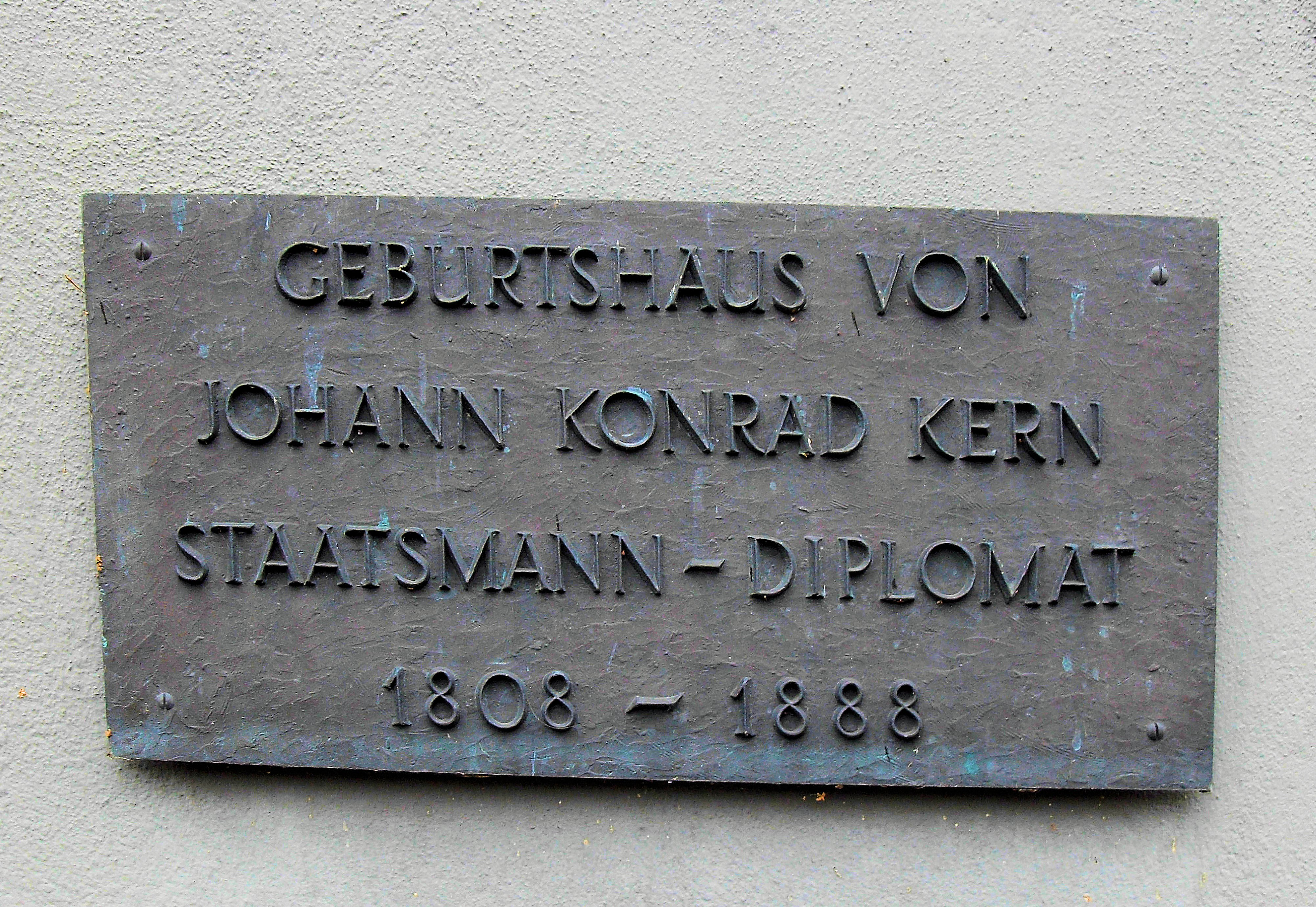 Gedenktafel am Geburtshaus des Schweizer Juristen und Nationalrats Johann Konrad Kern in Berlingen, Kanton Thurgau